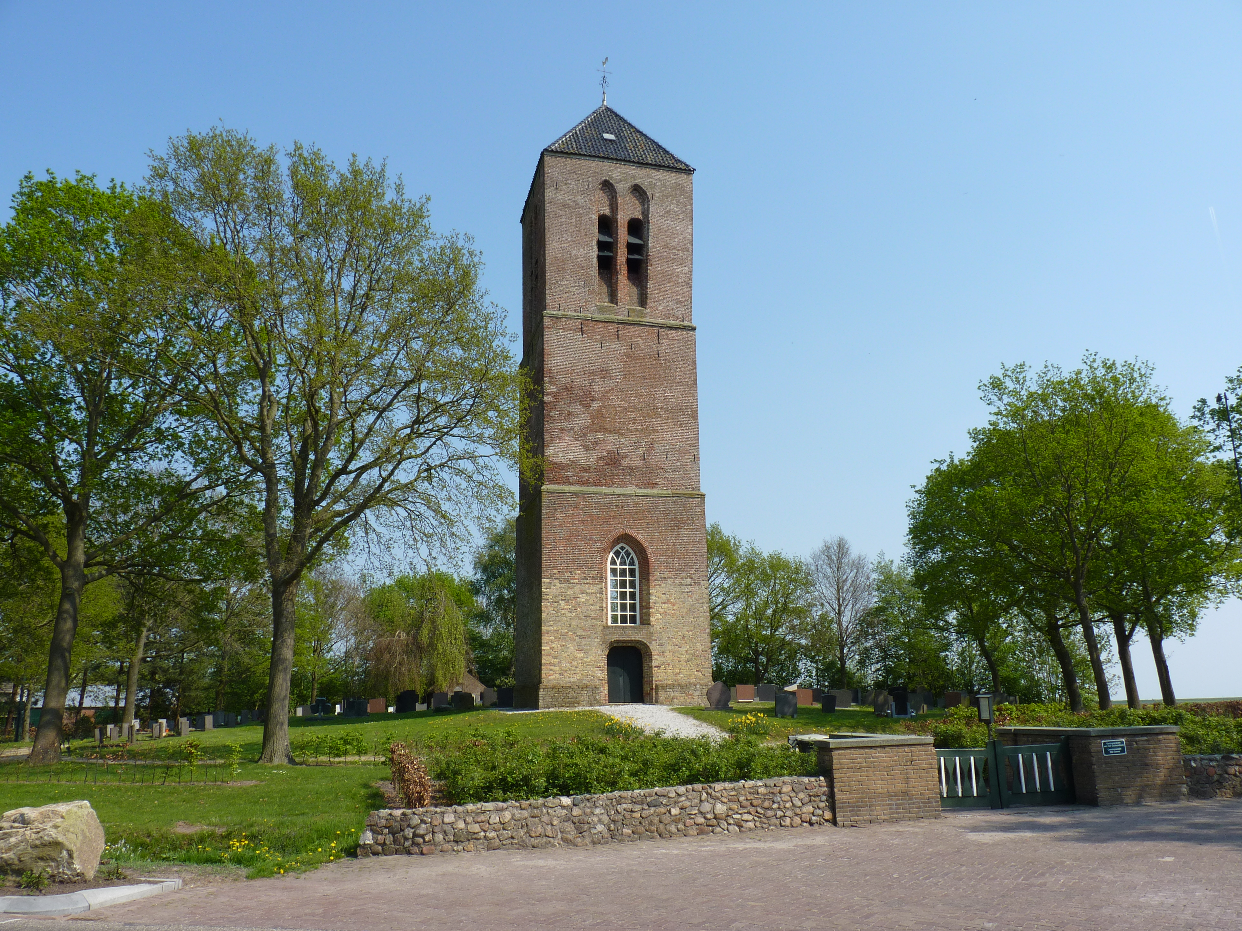 Nijemirdum Toren